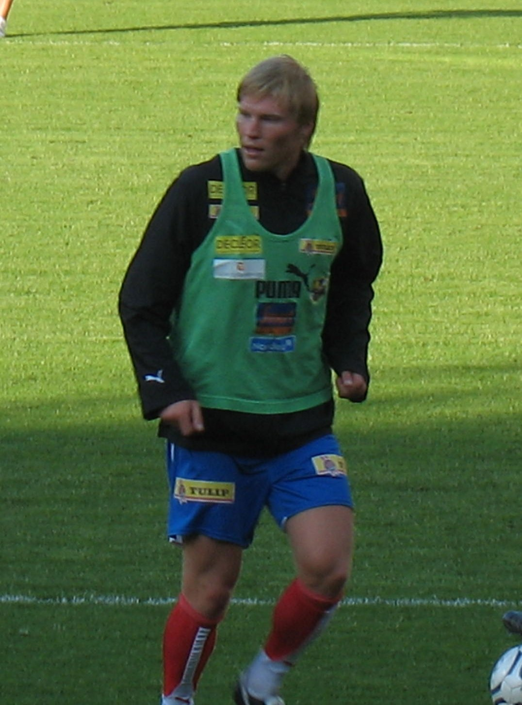 Fotballspilleren Tomasz Sokolowski